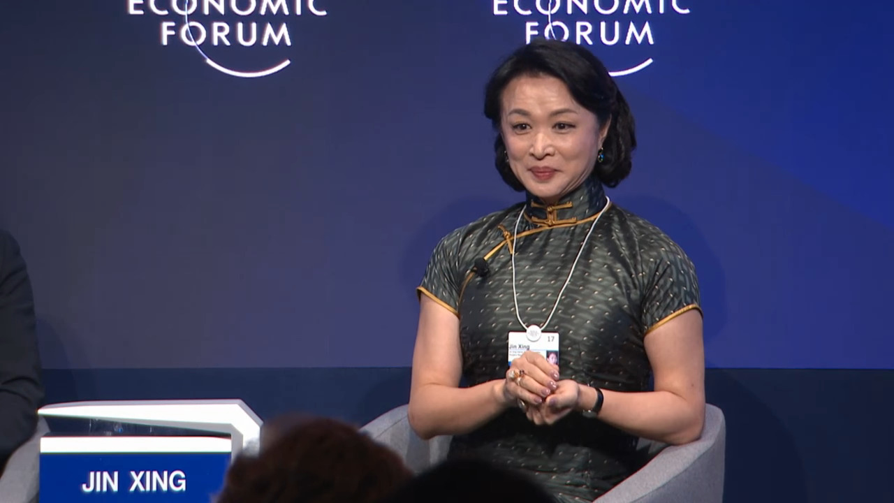 Jin Xing